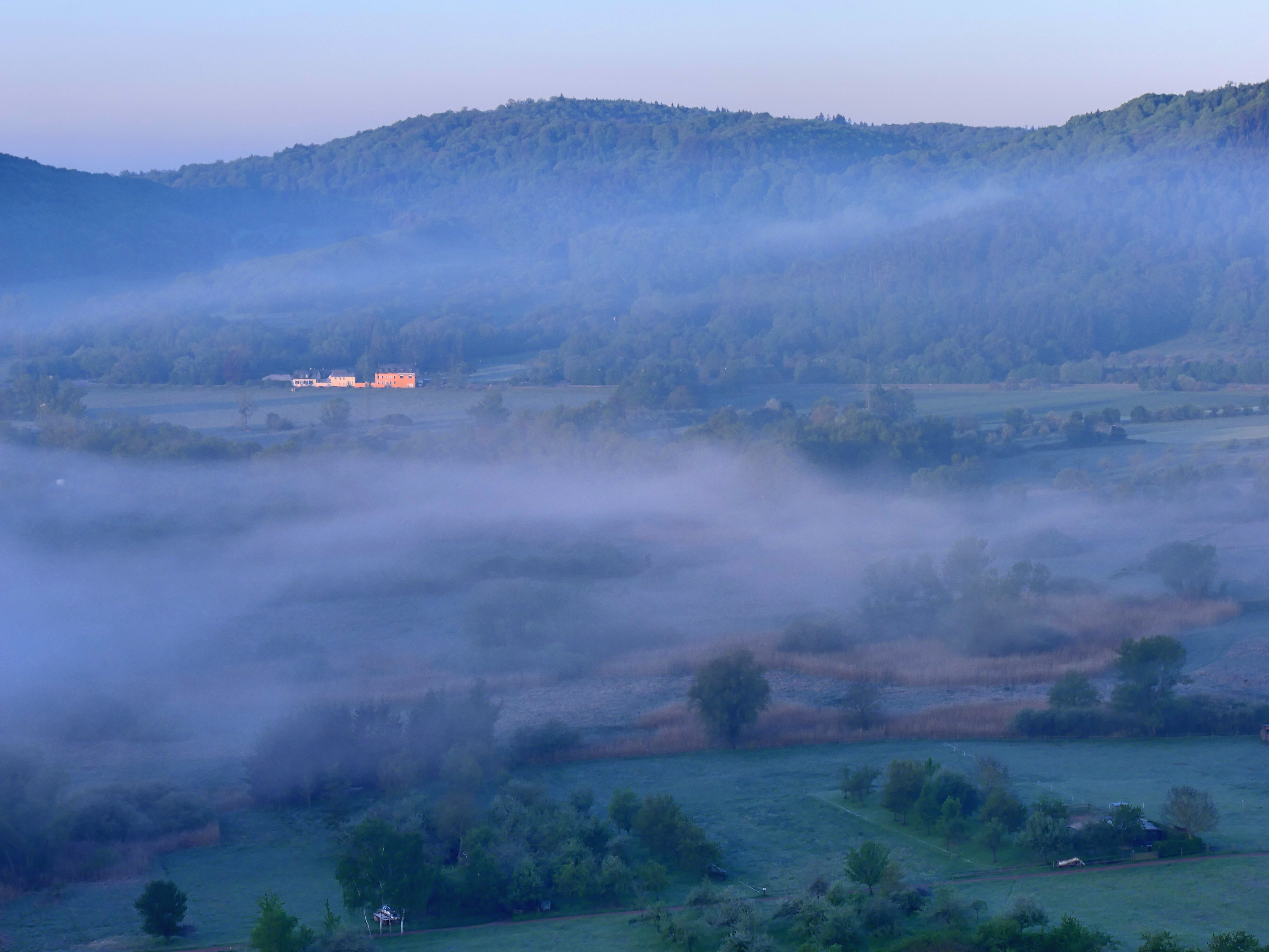 Wawerner Bruch: Feuchtbiotopzone mit Schilfröhricht, Großseggen-Riedern und nassen Hochstaudenfluren sowie Teilstück eines verlandeten Saar-Mäanders